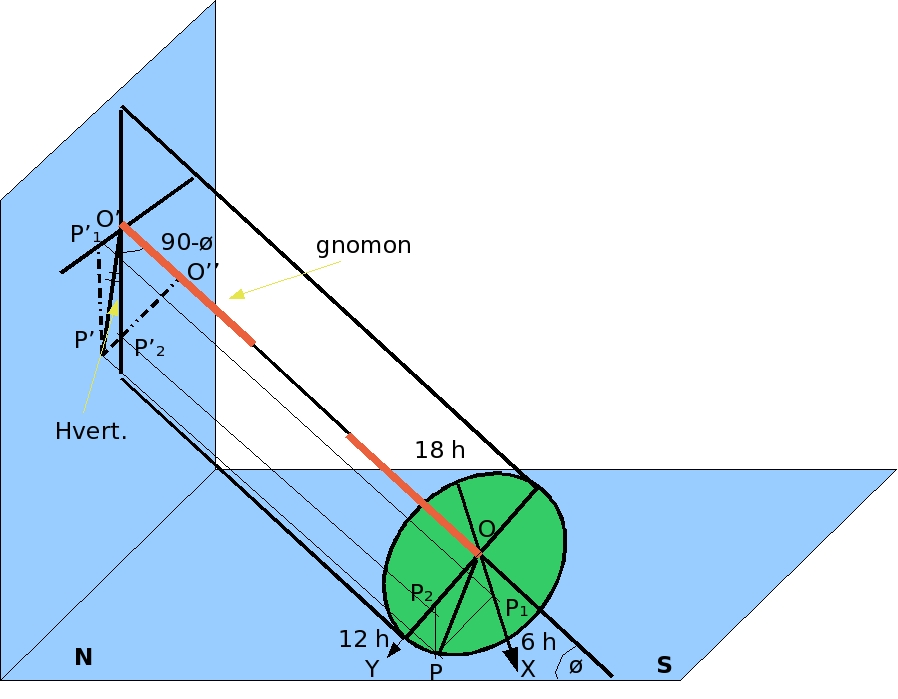 RPLl2006